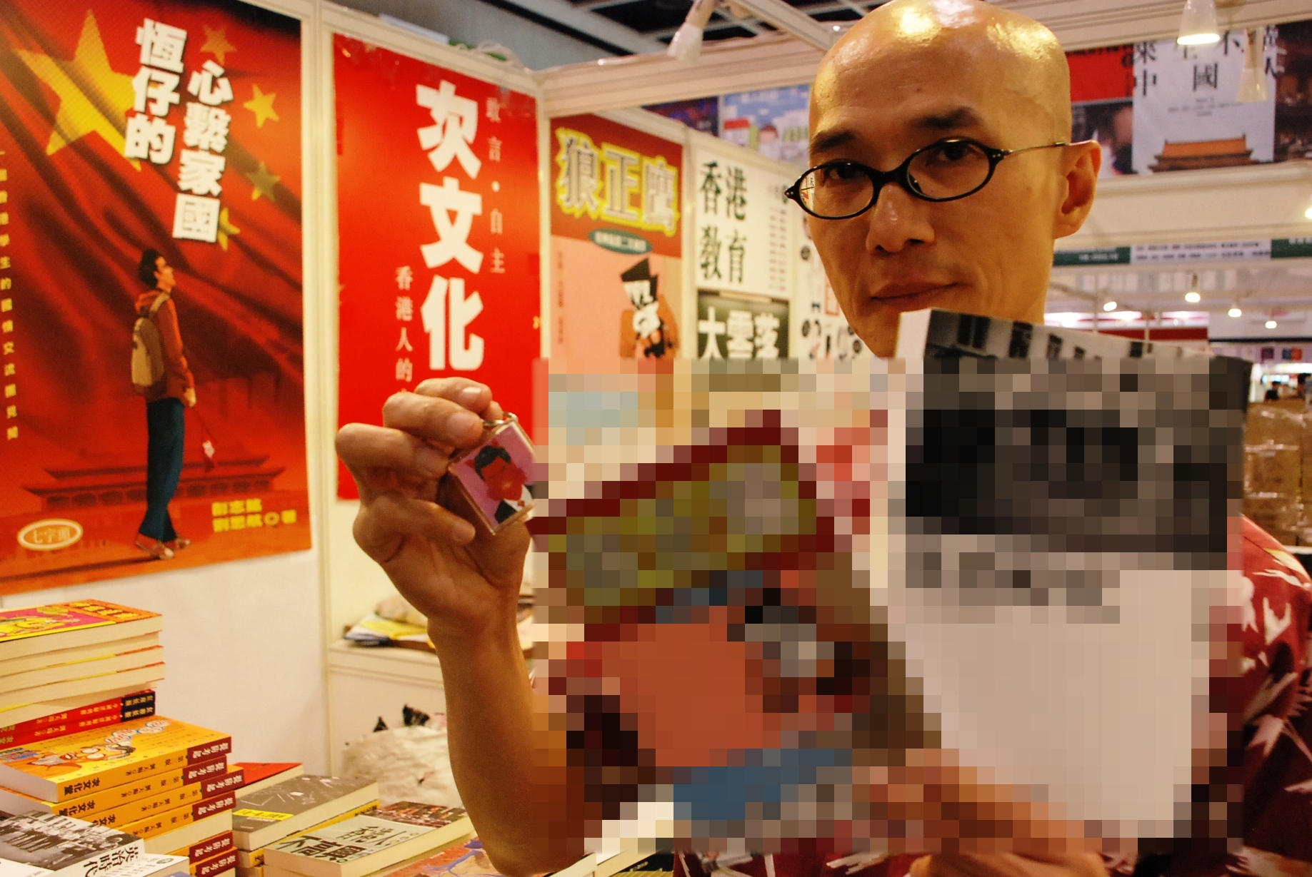 次文化堂社長彭志銘展示兩本今年書展出版、關於新任香港特首梁振英的新書。